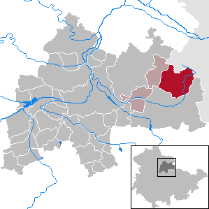 Rastenberg in Thuringia - District Sömmerda